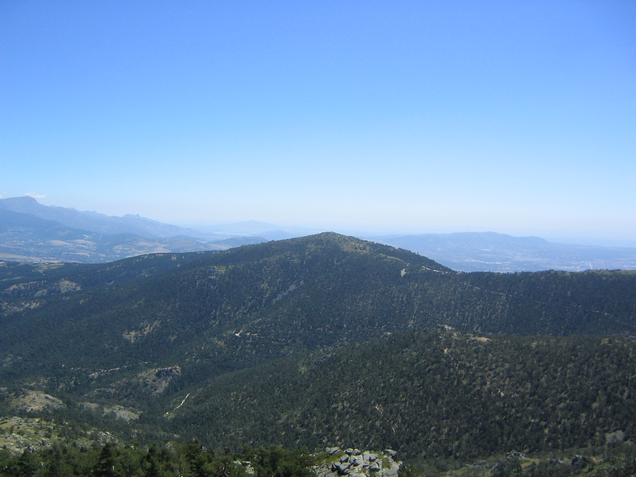 Cabeza Líjar. El Espinar, Segovia, España.